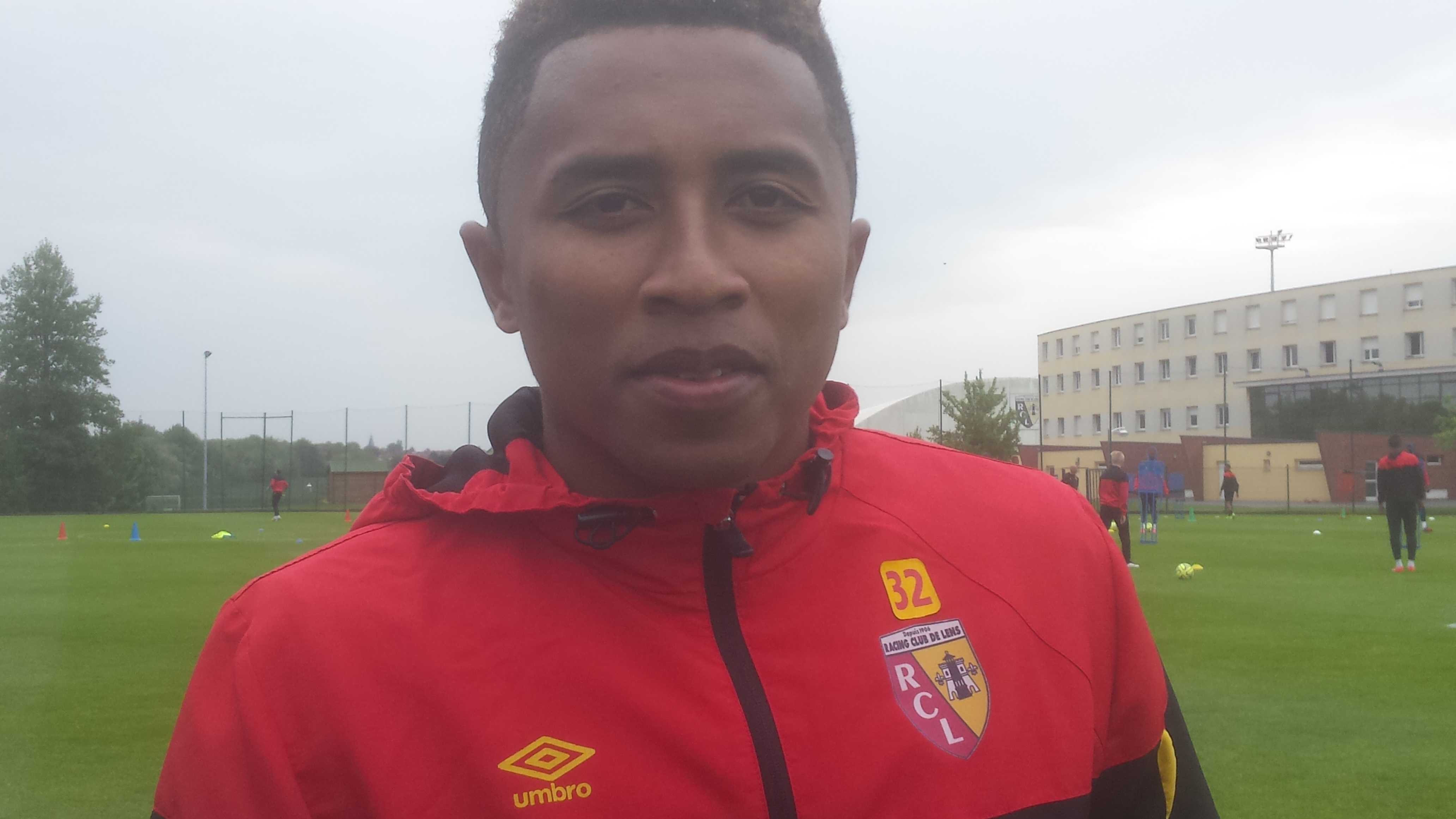 Lalaina Nomenjanahary lors d'un entraînement public, le 14 mai 2015, sur le terrain San Siro du Centre technique et sportif de La Gaillette.